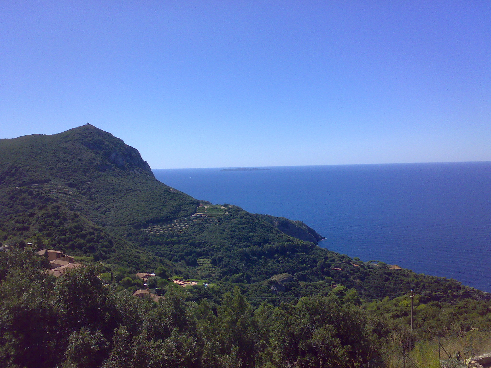 La costa di capo d'uomo, sullo sfondo in alto al centro l'isola di Giannutri.